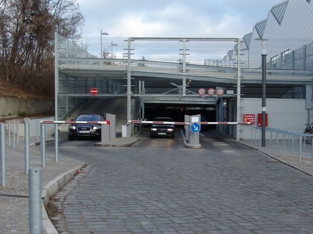 Ein- und Ausfahrt der Parkpalette des Einkaufszentrums LIO am Bahnhof Berlin-Lichterfelde Ost